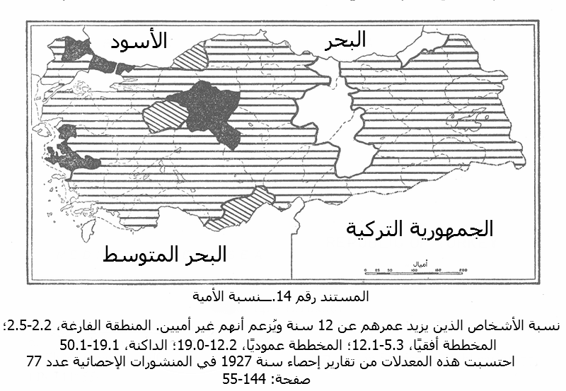 خريطة نُشرت في عام 1935، في مقال تحت عنوان "تركيا تحت حكم أتاتورك" بقلم دونالد وبستر. تُظهر الخريطة بنية الجمهرة السكانية عام 1927. وهي حرّة وفق قوانين الولايات المتحدة. إذ أن المعلومات الواردة فيها هي معلومات إحصائية، موضوعة في الملكية العامة.